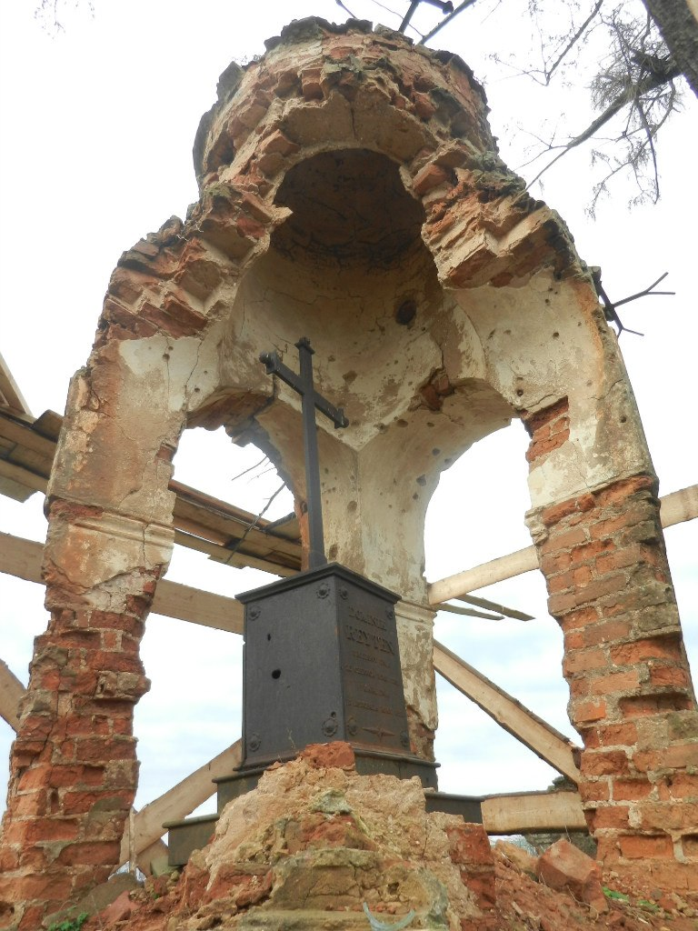 Каплица Даминика Рейтнена в Ляховичах